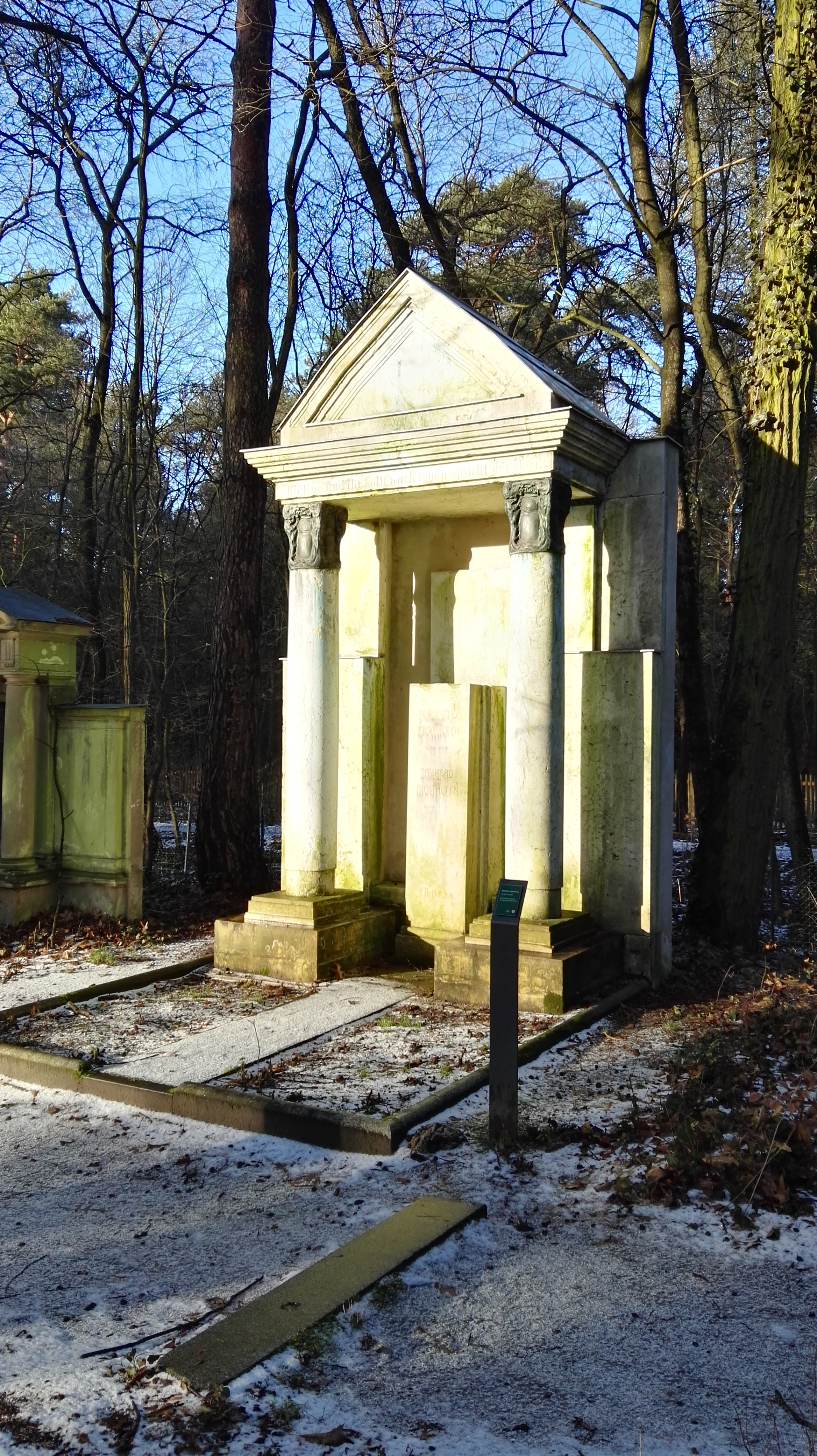 Grab von Ferdinand von Richthofen auf dem Südwestkirchhof Stahnsdorf